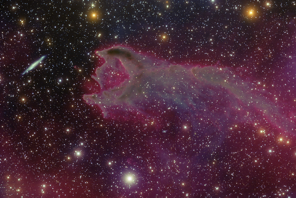 Cometary globule CG4